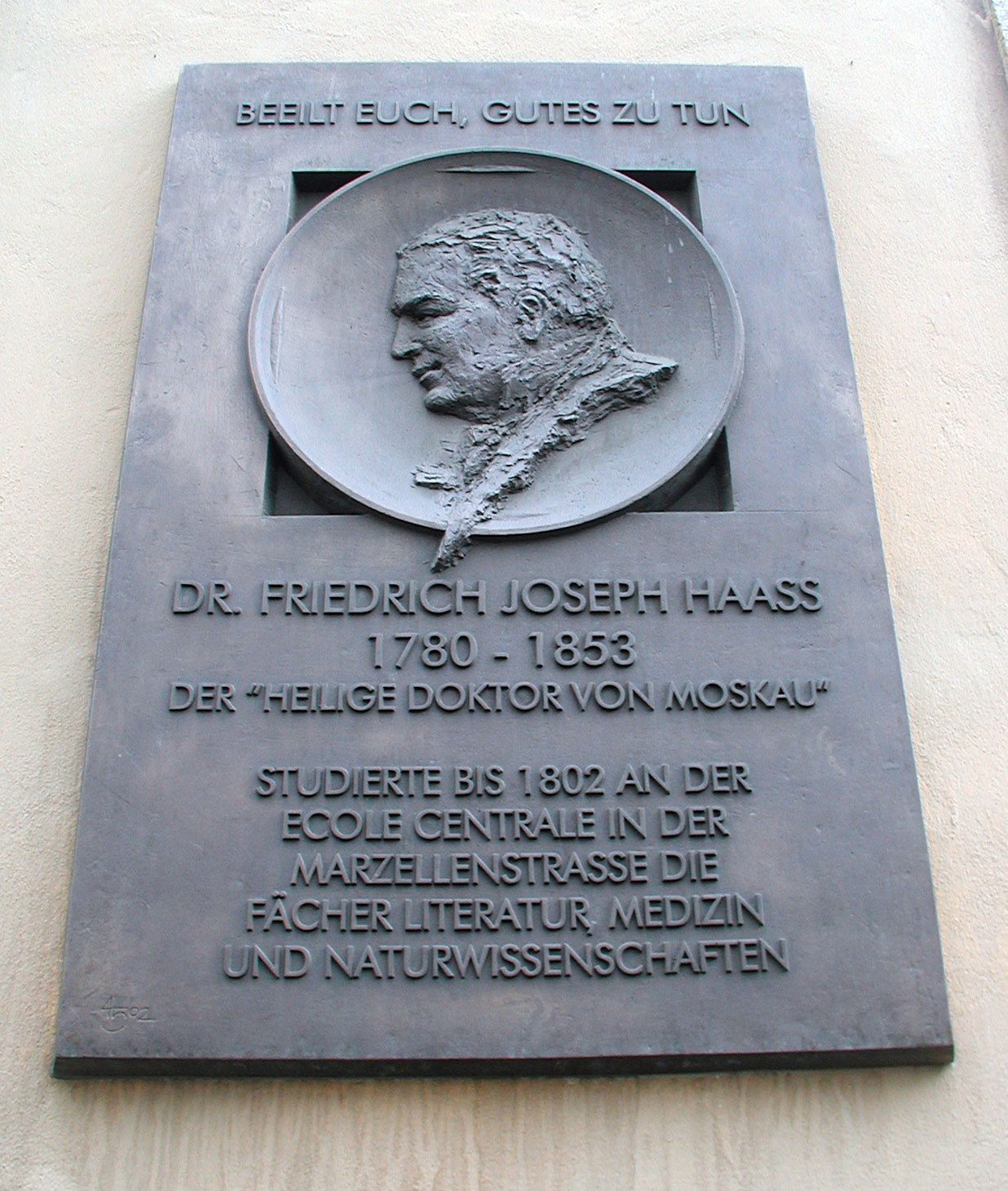 Gedenktafel für Friedrich-Joseph-Haass am Haus des erzbischöflichen Generalvikariats Marzellenstr. 32 in Köln. Entwurf: Herbert Halfmann, Düren. Höhe 140 cm. Aufgestellt 2002.